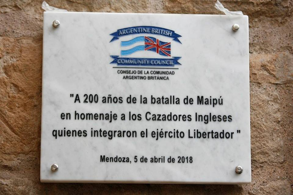 Reconocimiento a los Cazadores Ingleses que formaron en el Ejército de San Martín.